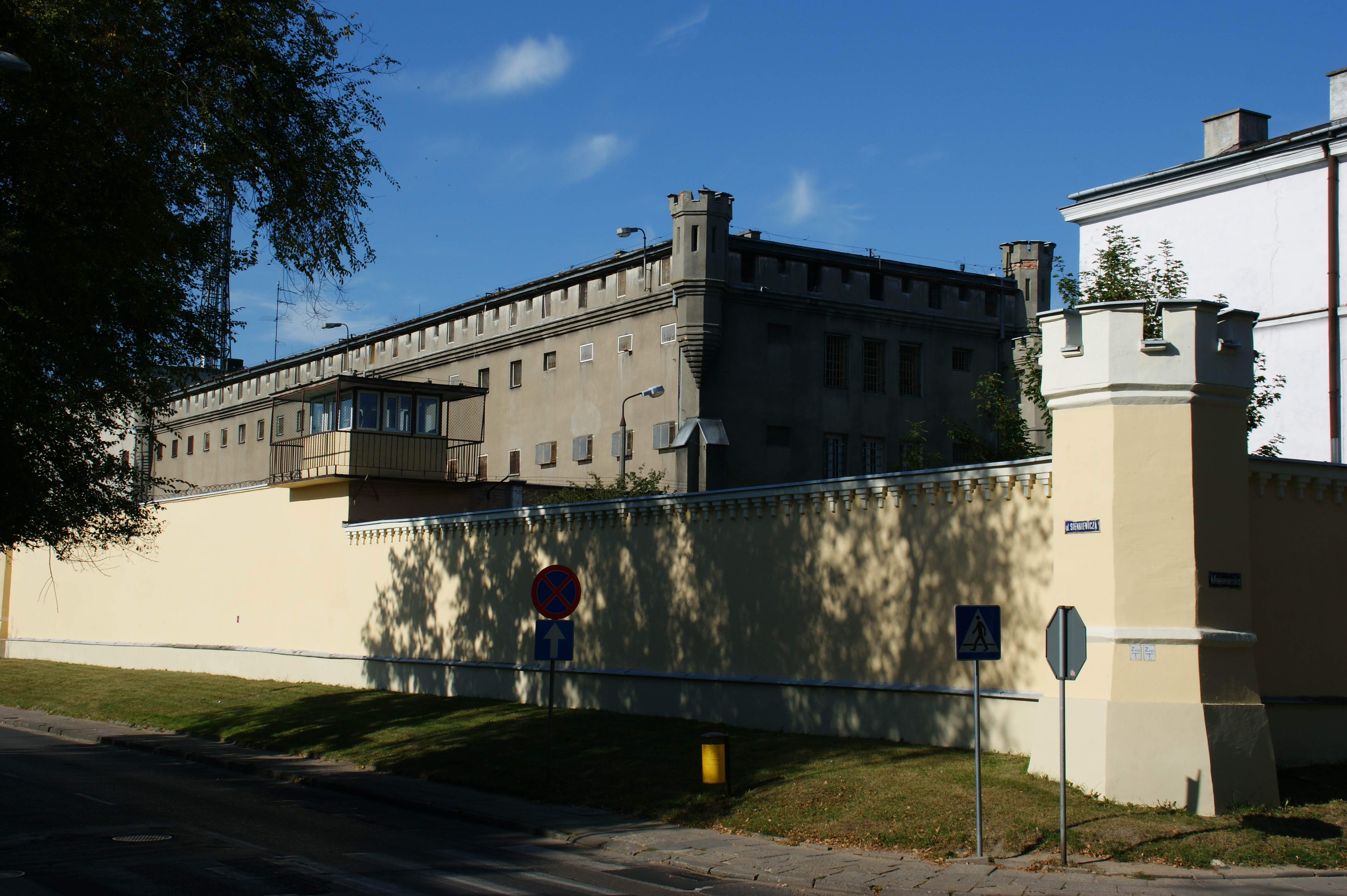 Więzienie stare, mur., 1803 Płock, ul. Sienkiewicza 22 12.1988.